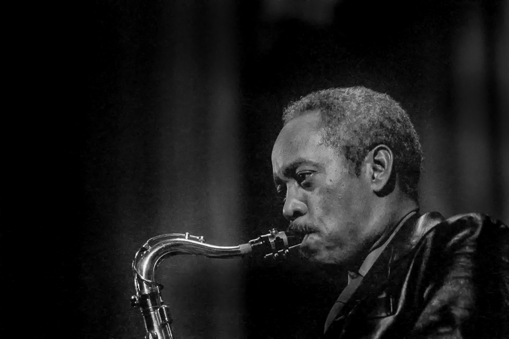 Sonny Stitt, The Giants of Jazz, Sigma 7 1971